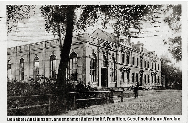 Barberina, Ballhaus Chemnitz, beliebter Ausflugsort, angenehmer Aufenthalt, Familien, Gesellschaften und Vereine